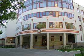 Новое здание школы